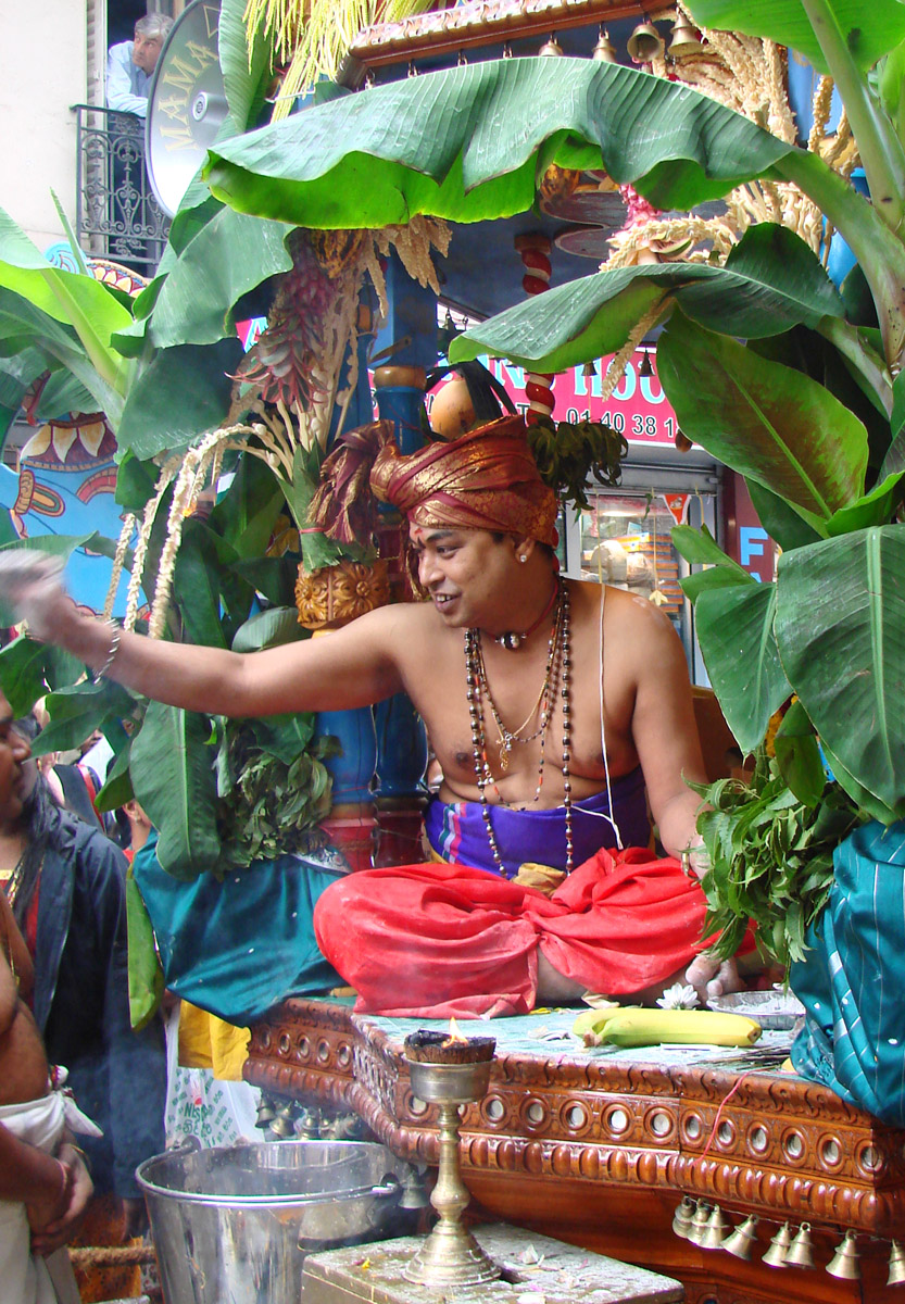 Un prêtre brahmane sur le char du frère de Ganesh : Murugan La défilé du char de Ganesh (Ganesh Chaturthi) s'est déroulé dimanche 31 août 2008 à Paris dans le quartier de la gare du nord. Elle est organisée chaque année par l'association du temple de Ganesh (Sri Manicka Vinayakar Alayam) et rassemble des milliers d'hindous.